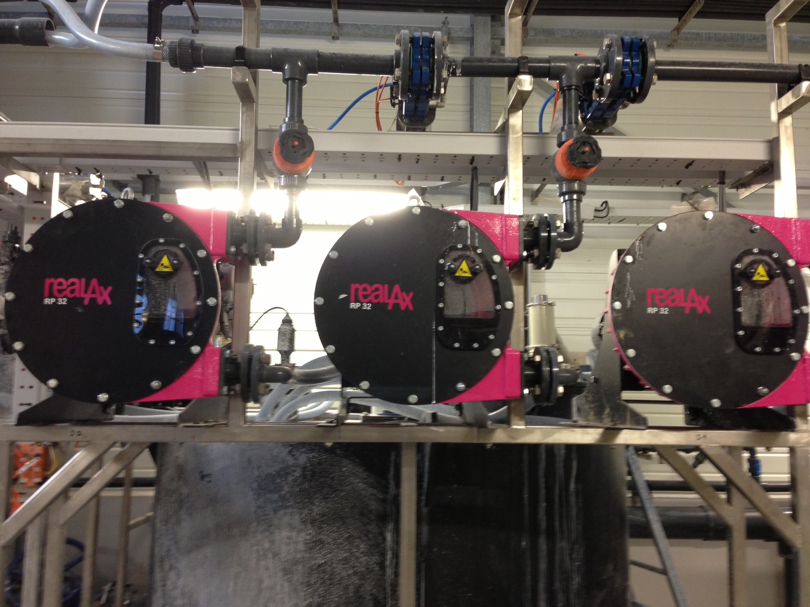 Pompe péristaltique application lait de chaux